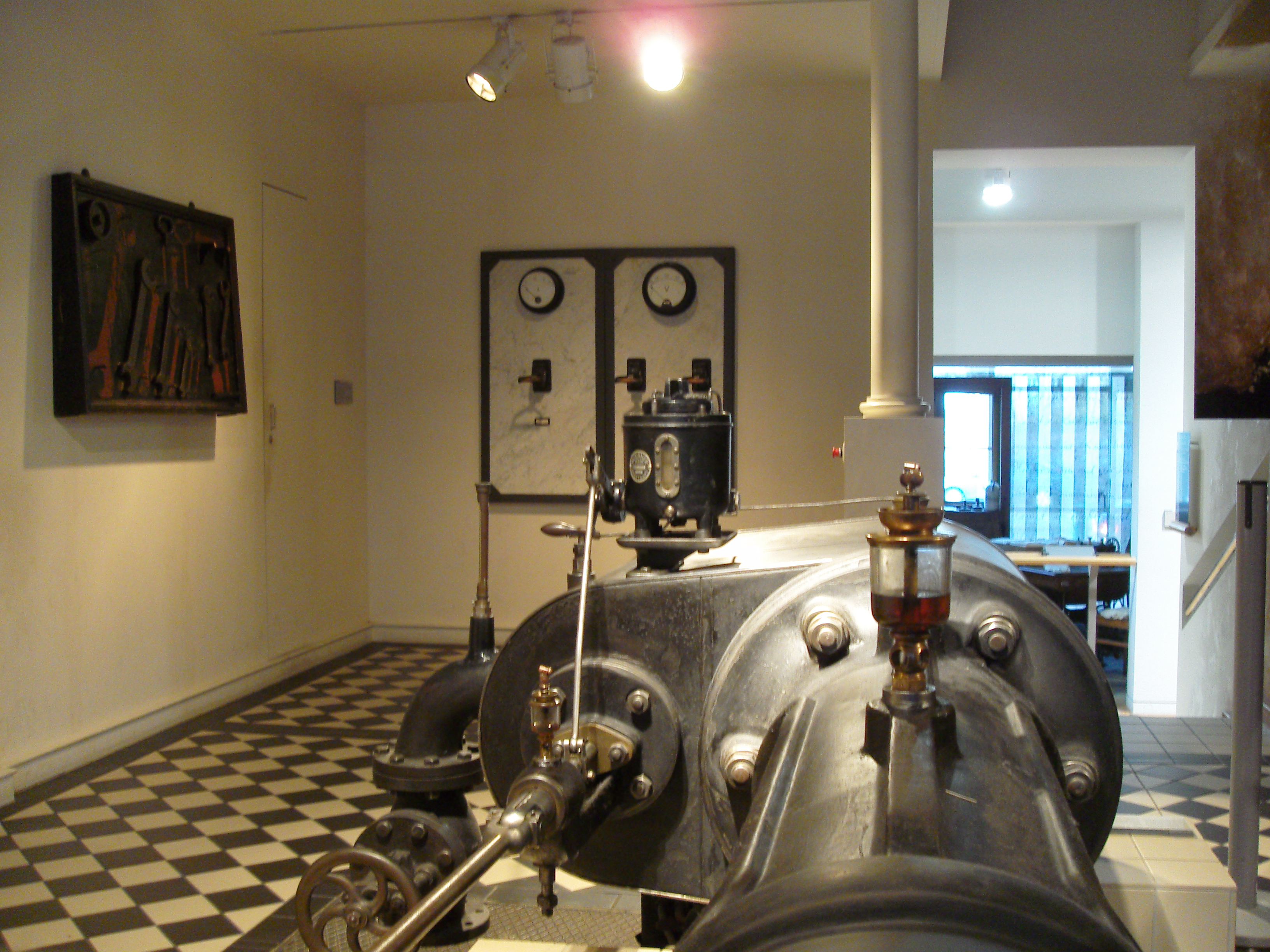 Steam engine lubrication - Ausstellungsstück der DASA in Dortmund